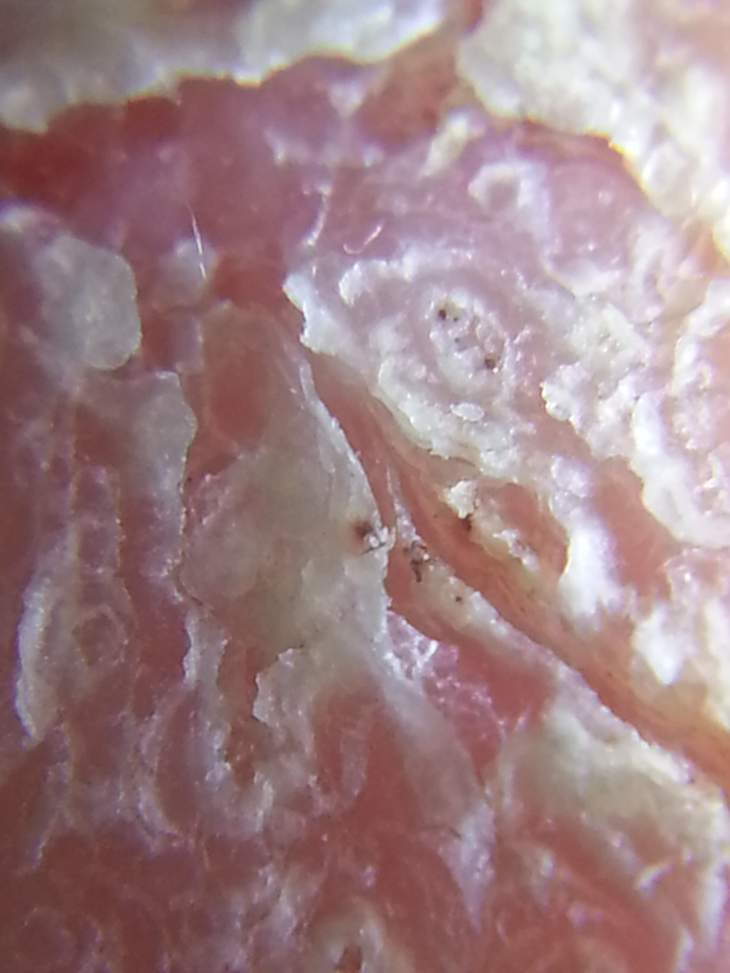 dermatite atopica mano dx